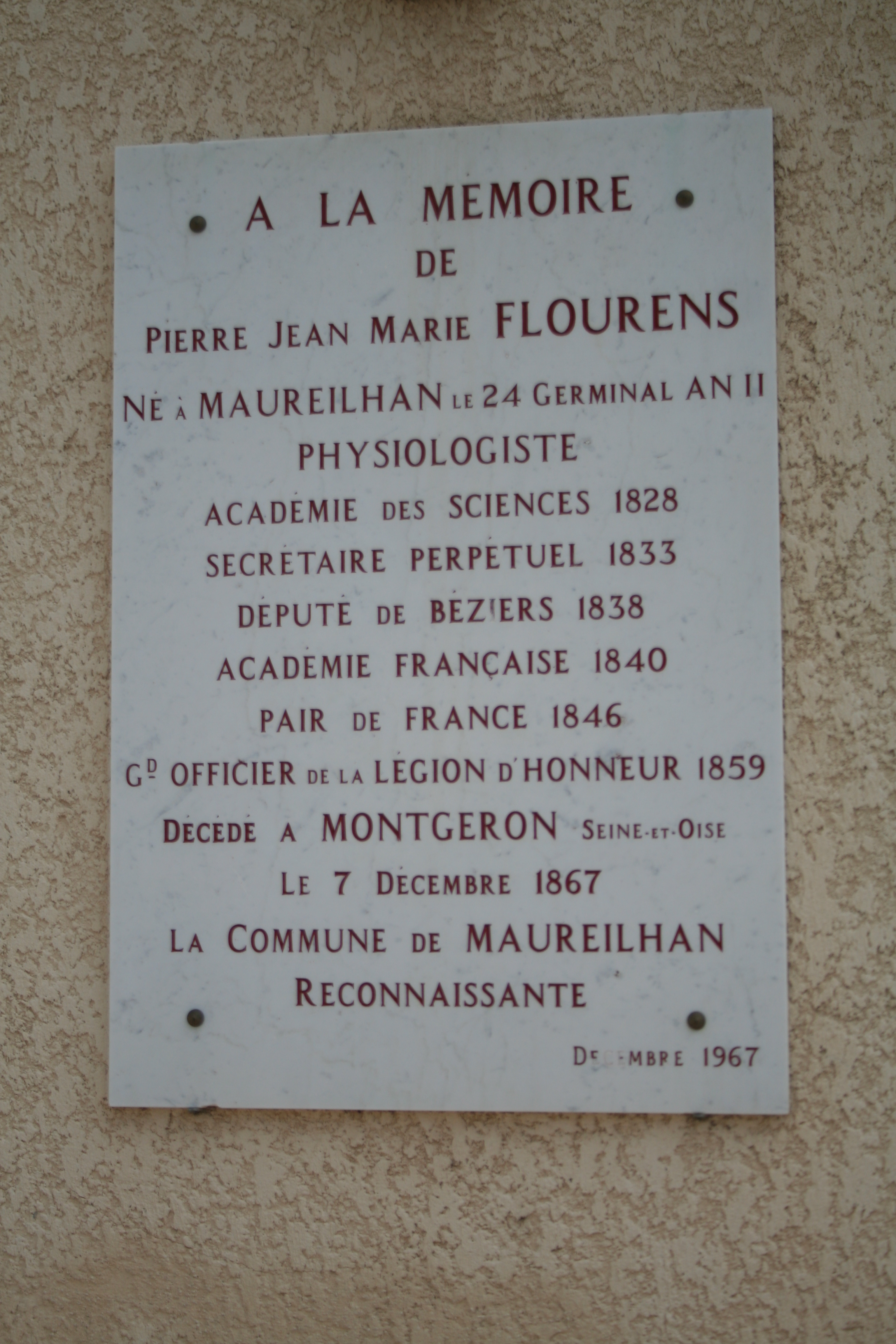 Maureilhan (Hérault) - plaque Pierre Jean Marie Flourens (24 germinal an II, 1867), physiologiste, académicien des sciences, député de Béziers, Académie Française, Pair de France